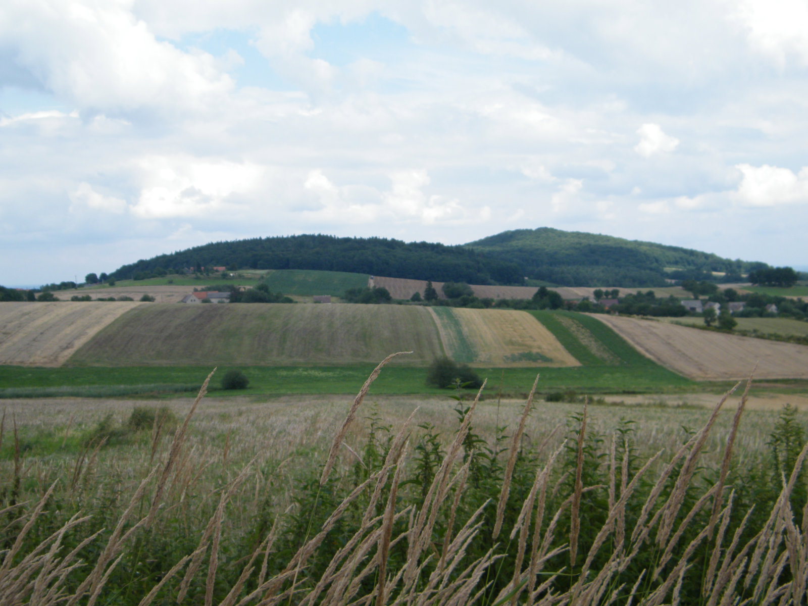 Góra Gromnik Widoczna od strony południowej.